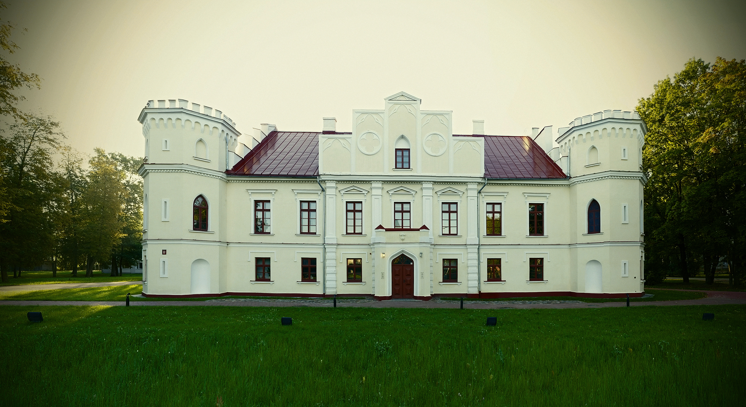 Valdekas pils, Jelgava, Rīgas iela 22